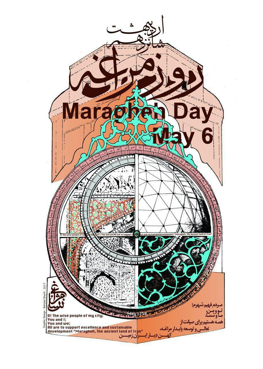 روز مراغه